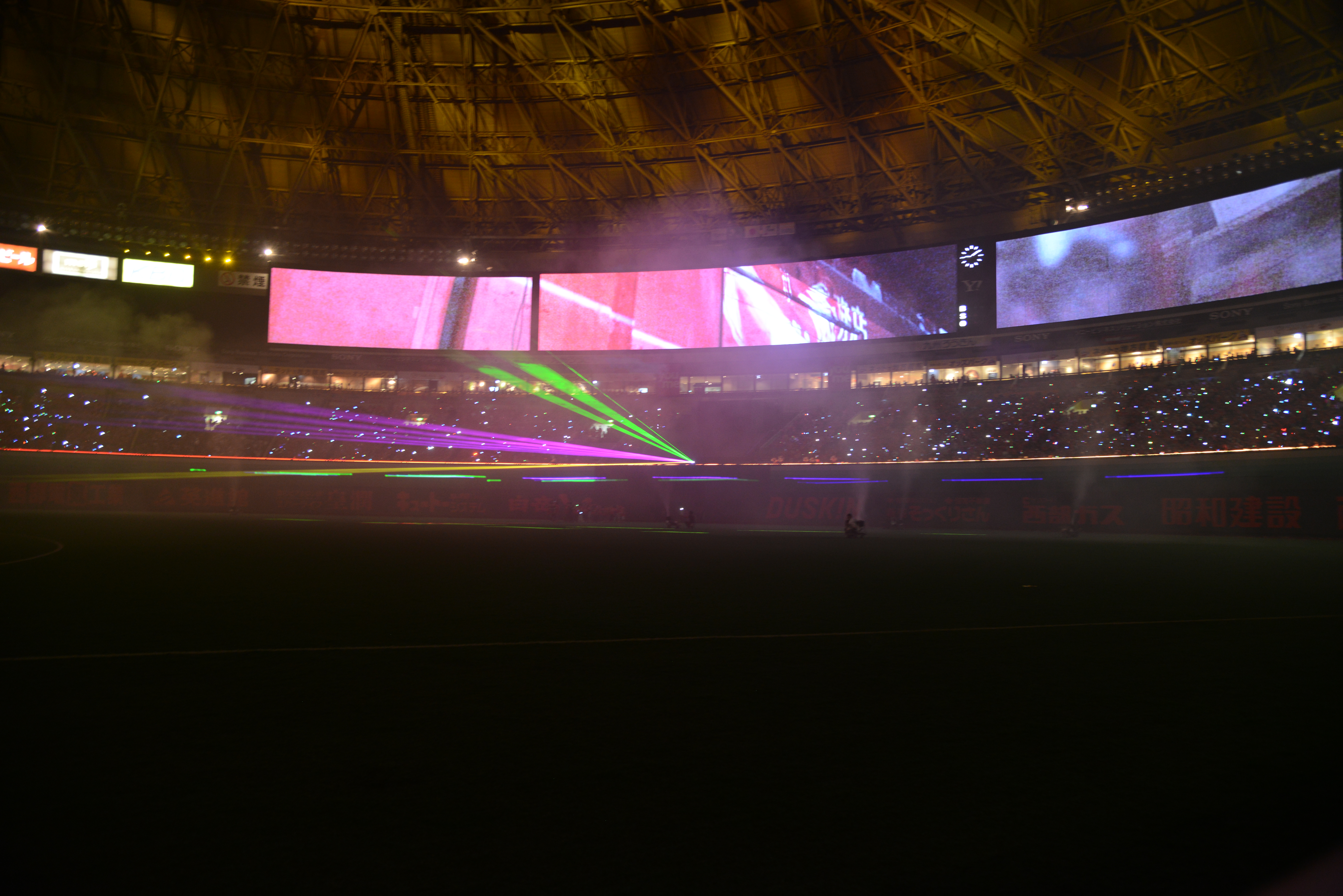 2014年度の "鷹の祭典" 試合終了後に行われた”光のドーム伝説”。2014年7月23日福岡ヤフオク！ドームにて開催